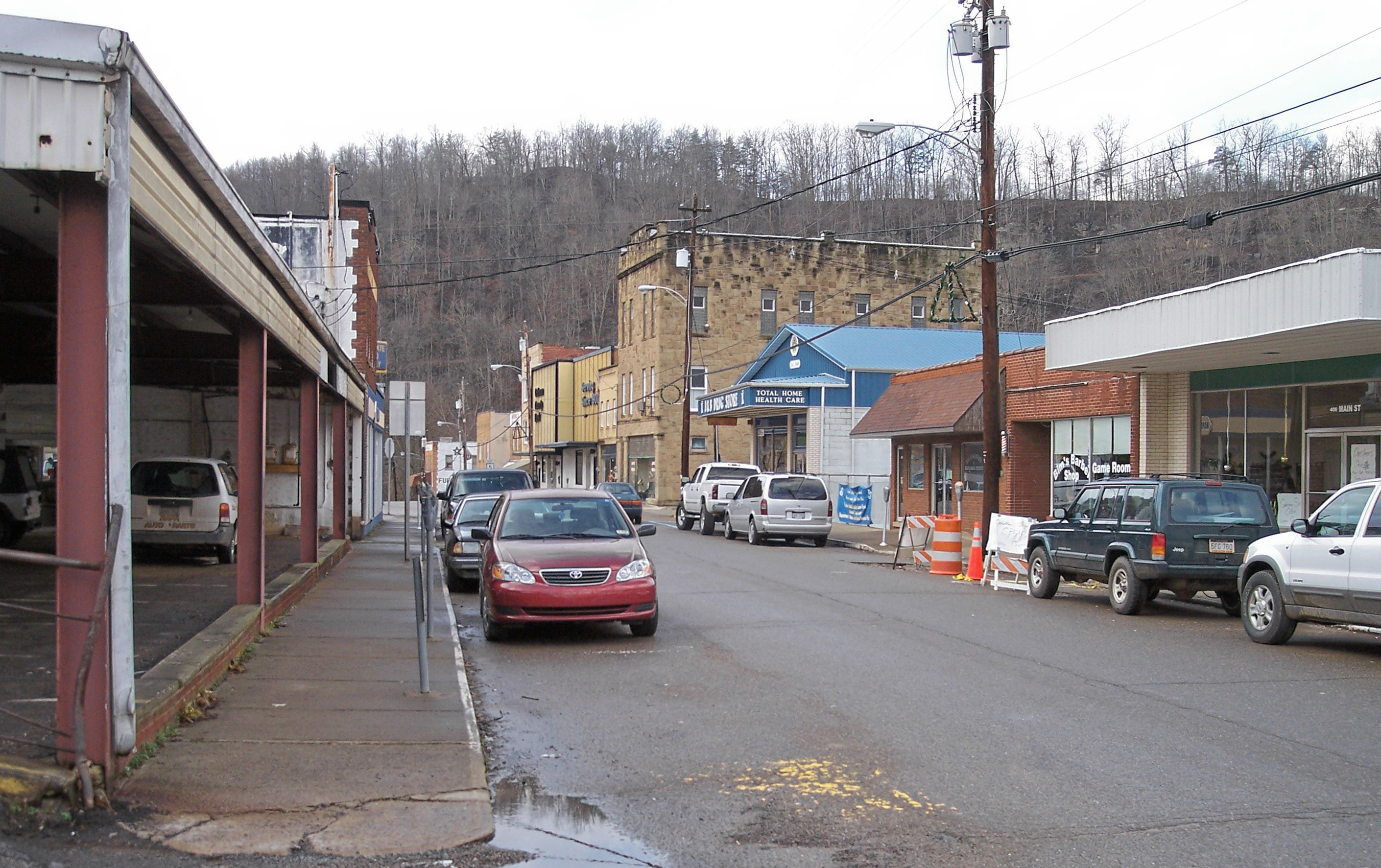 Main Street in Grantsville, West Virginia